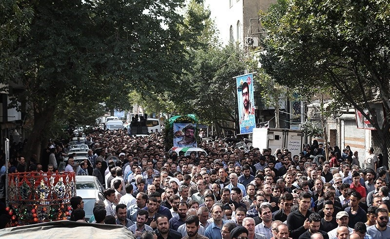 تشییع پیکر شهید مدافع حرم ابوالفضل نیکزاد